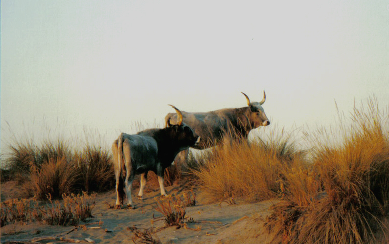 Buoi maremmani allo stato brado Autore: Vinattieri Matteo Data:25/01/2007